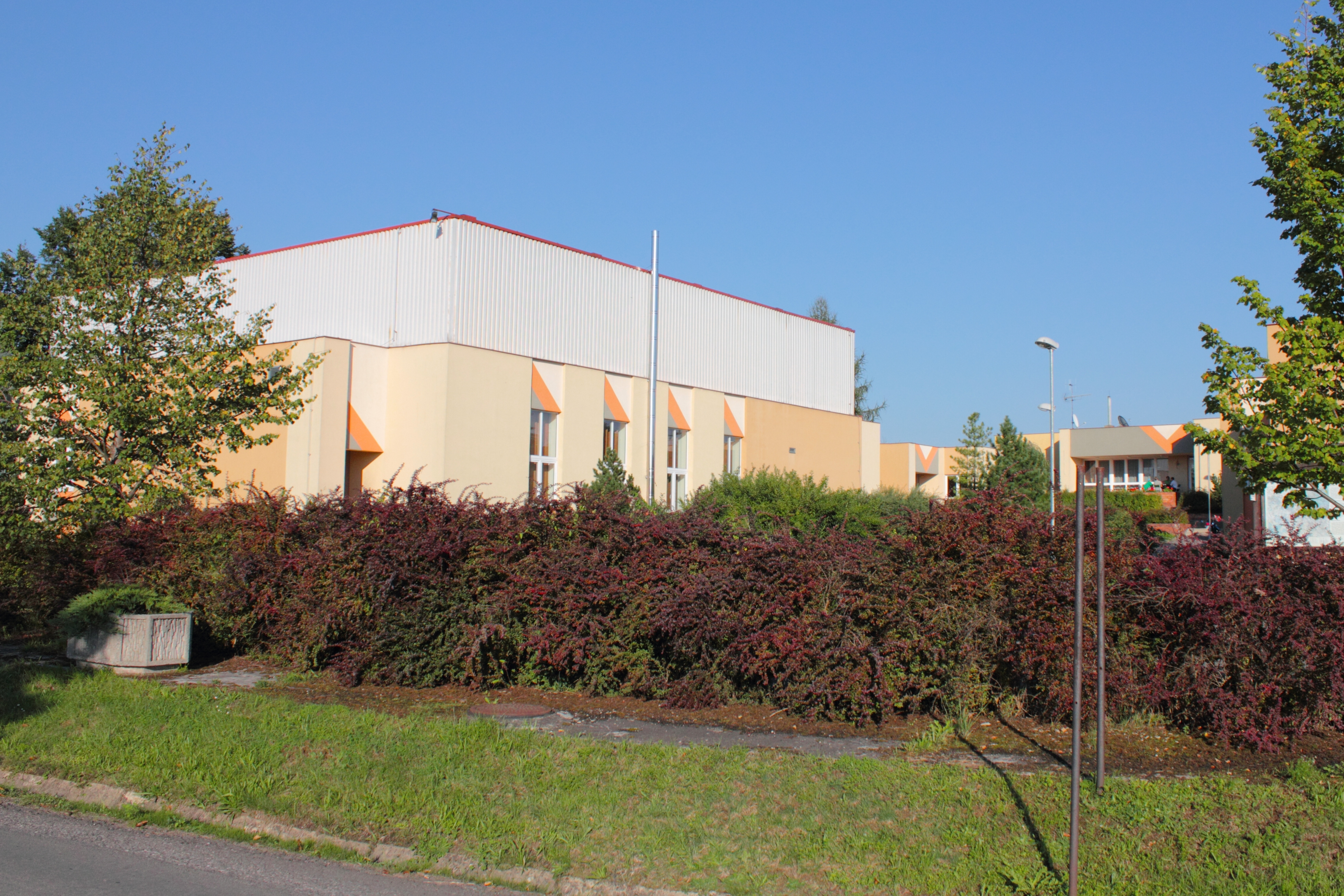 Kulturní dům, Pěnčín